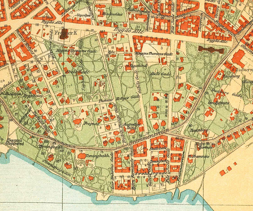 Kart over Skillebekk.